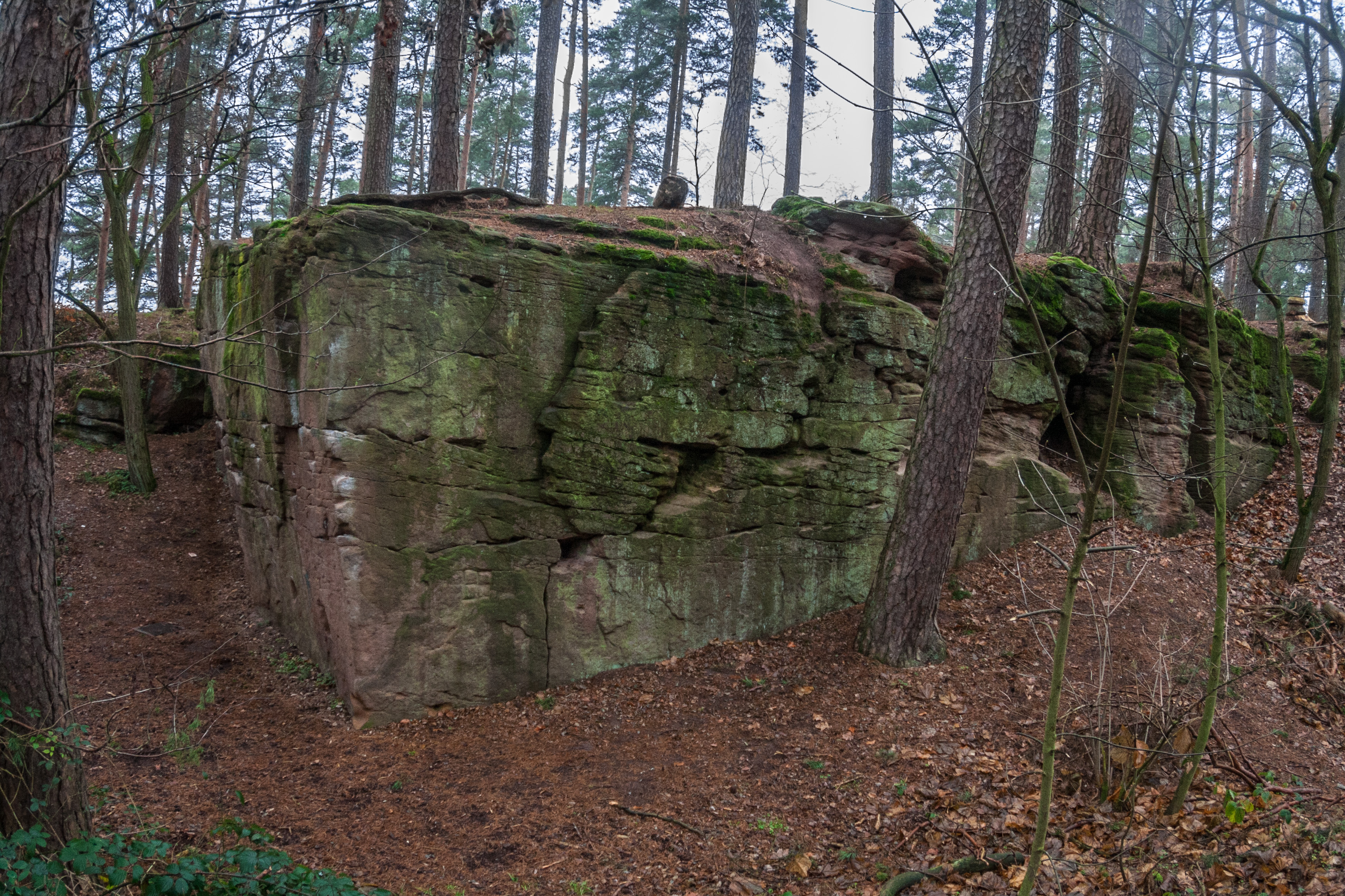 Steinbruch Fürther Stadtwald